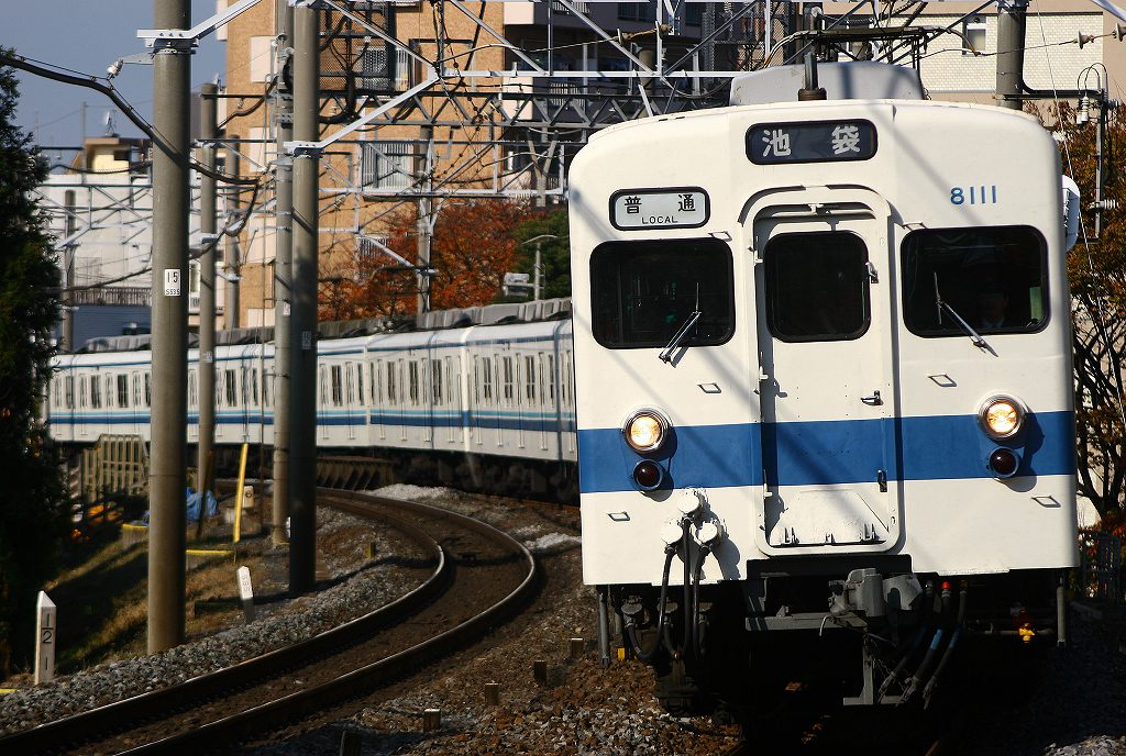 東武8000系8111です。